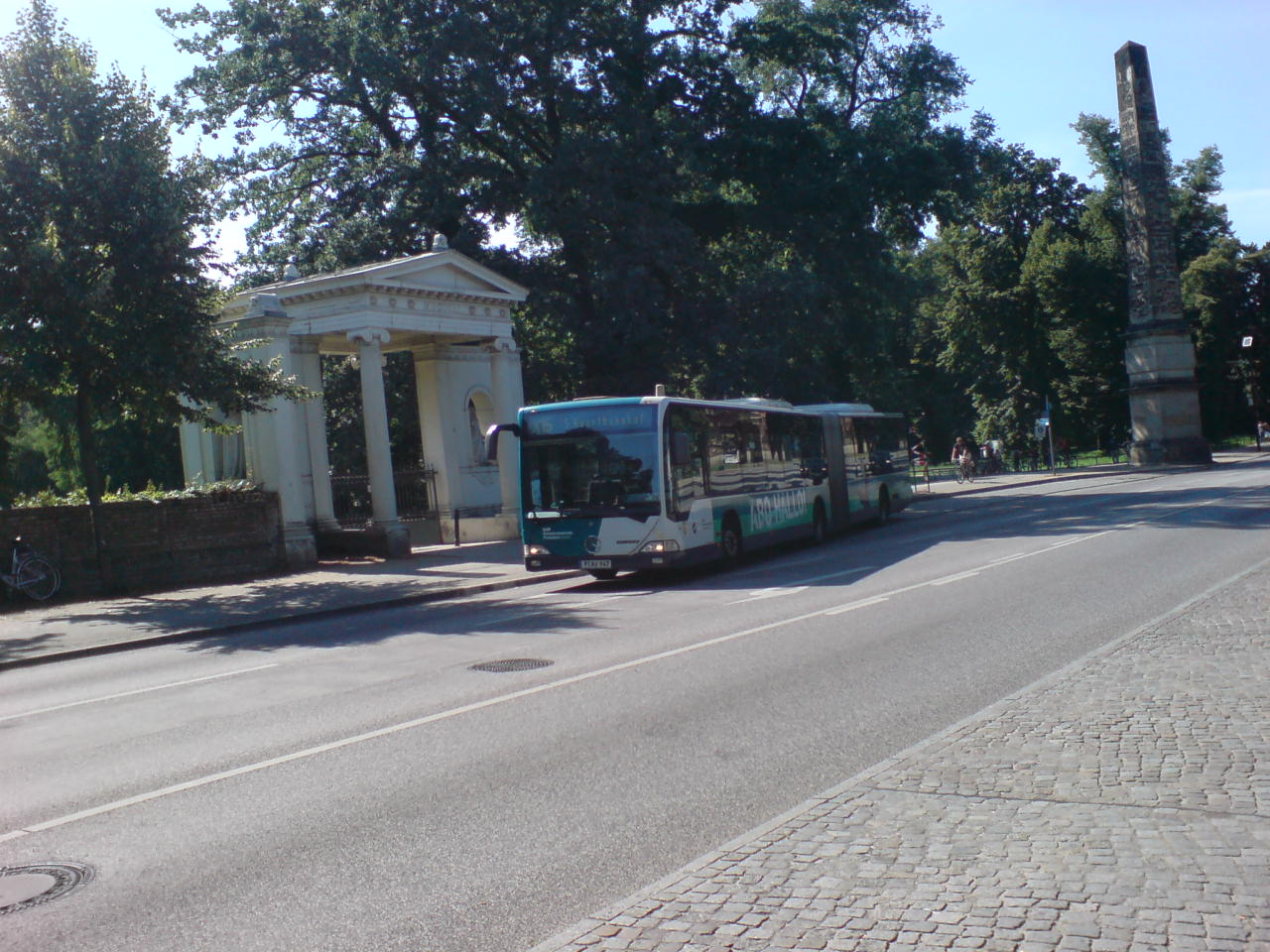 Ein Potsdamer Citaro-Gelenkbus am Park Sanssouci. Im Hintergrund ist der Obelisk zu erkennen, der den östlichen Eingang des Parks markiert. Das Fahrzeug verkehrt auf der nur im Sommer bedienten Linie X15, die eine Expresslinie zwischen Bahnhof und den Schlössern des Gartens darstellt.